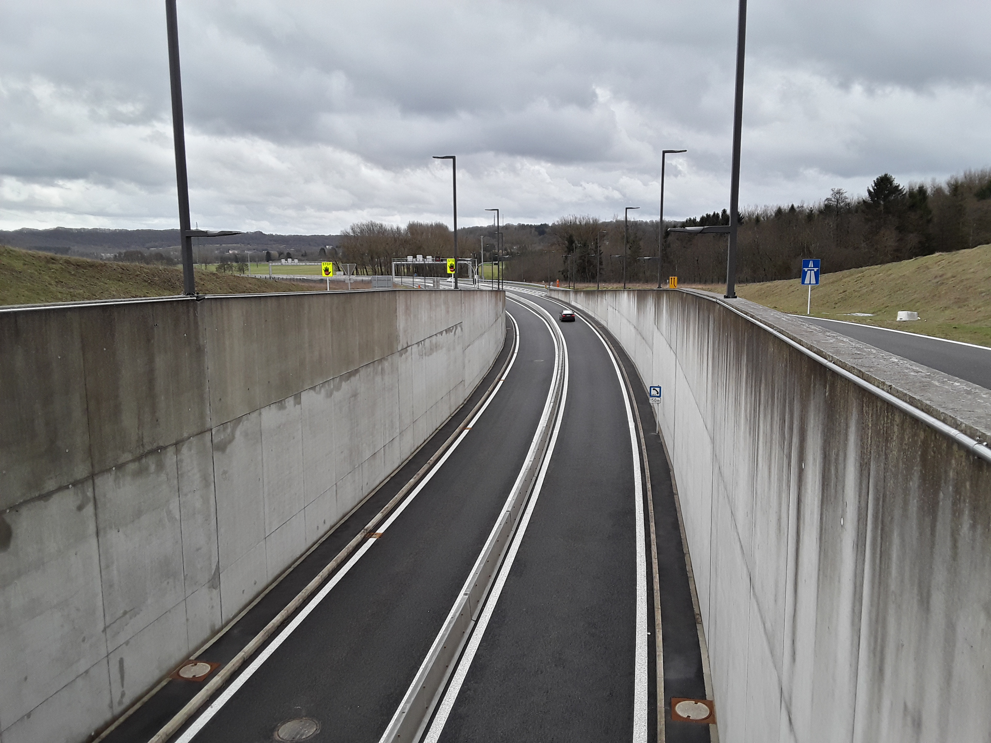 Liaison Micheville B40: Accès sud du tunnel